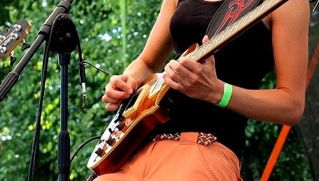 Česky: guitarist dona michelle